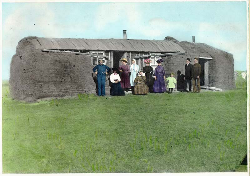 Saskatchewan sod house